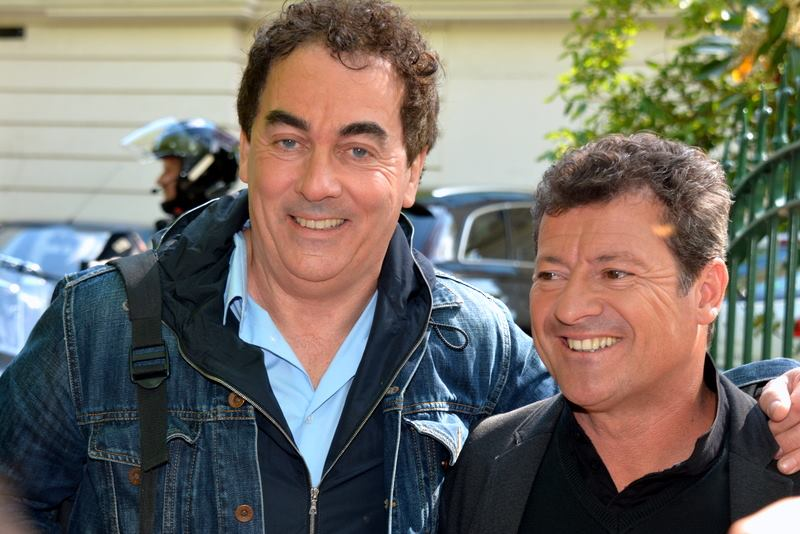 Les Chevaliers du fiel à l'enregistrement de "Vivement dimanche"